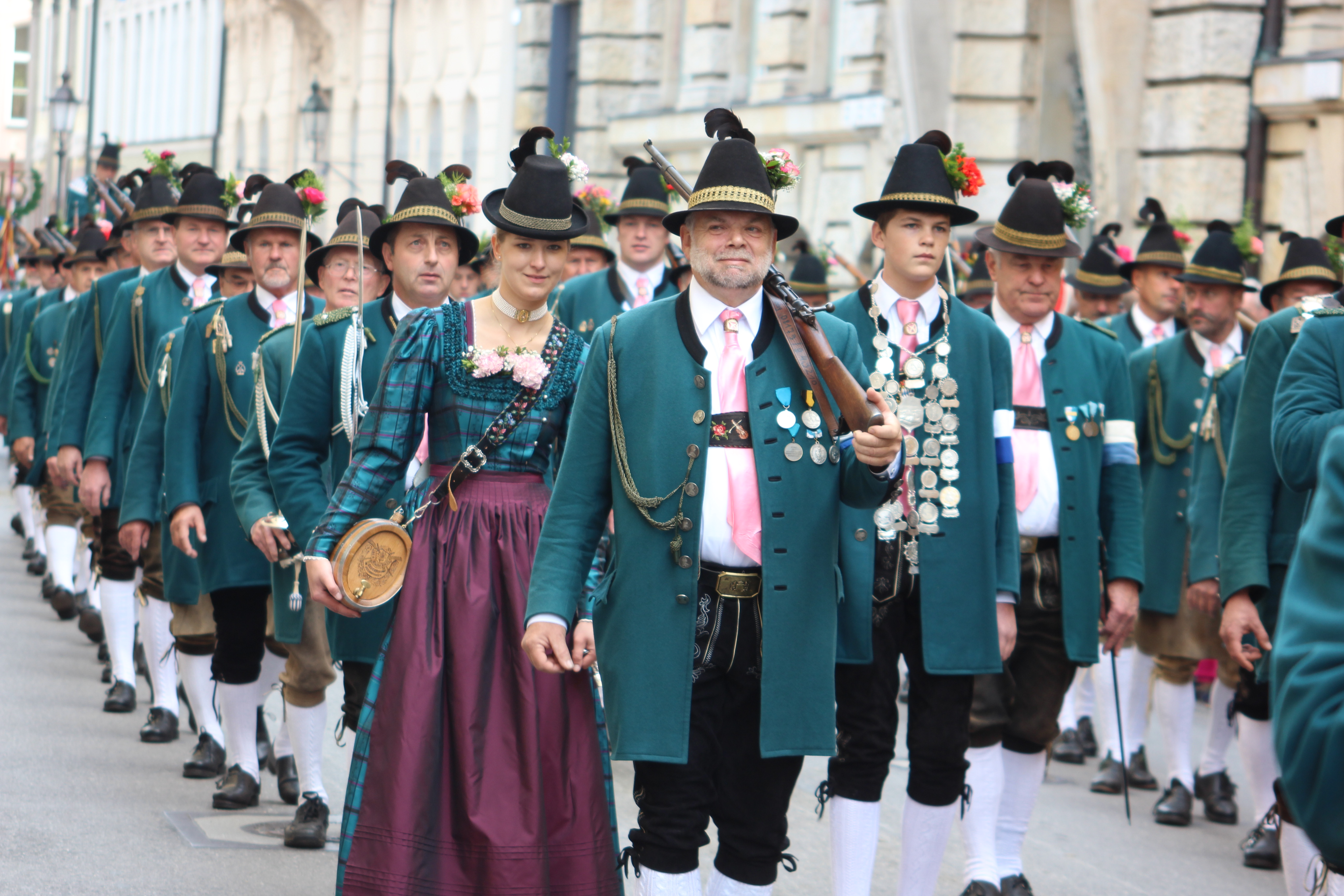 Teilnhmer aus Beuerberg auf dem Trachten- und Schützenzug in München am ersten Oktoberfestsonntag.